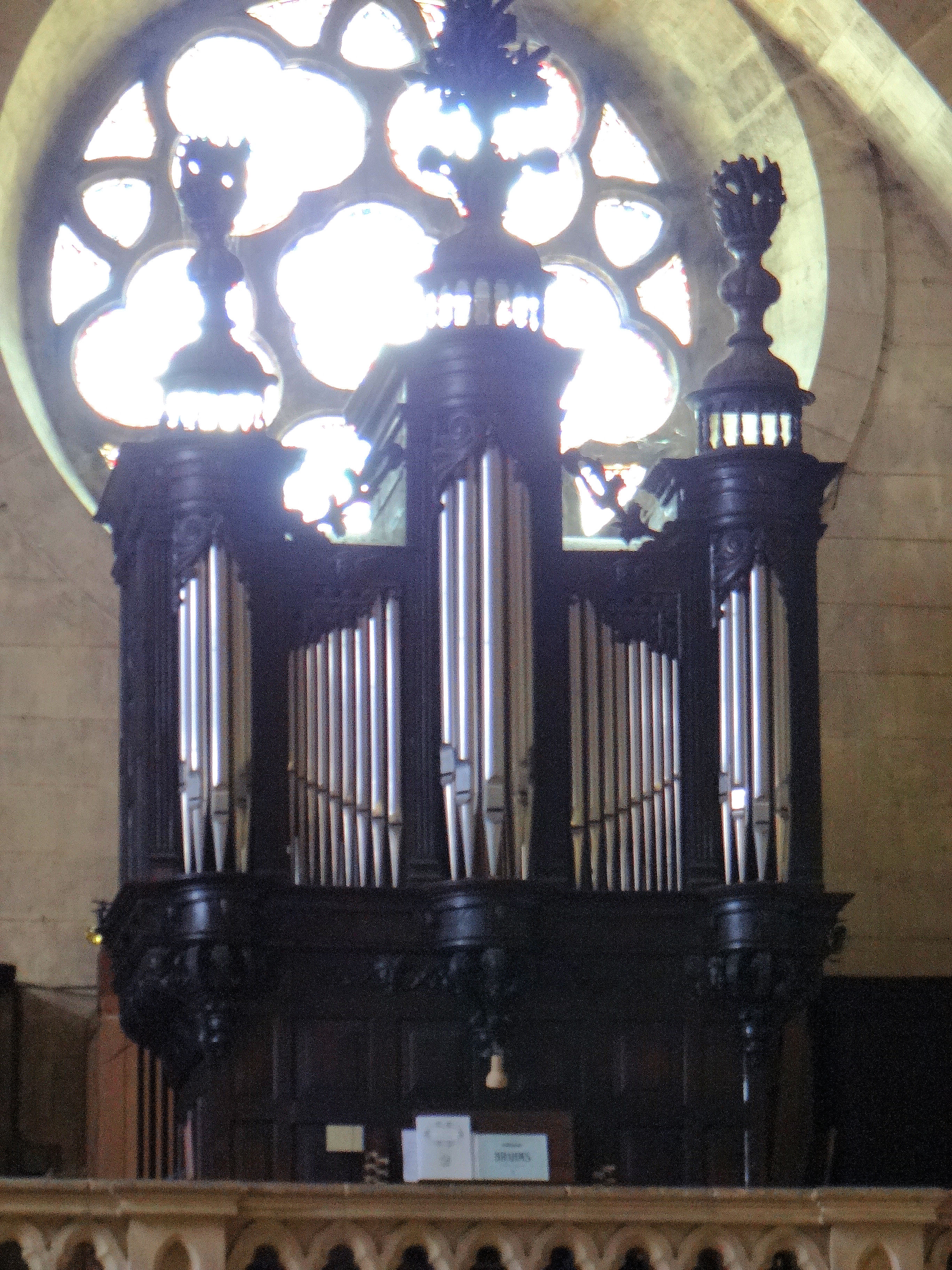 Saint-Cyprien - Église Saint-Cyprien - Orgue de 1980 de Gerhard Grenzig (Barcelone) dans un buffet du XVIIe siècle.